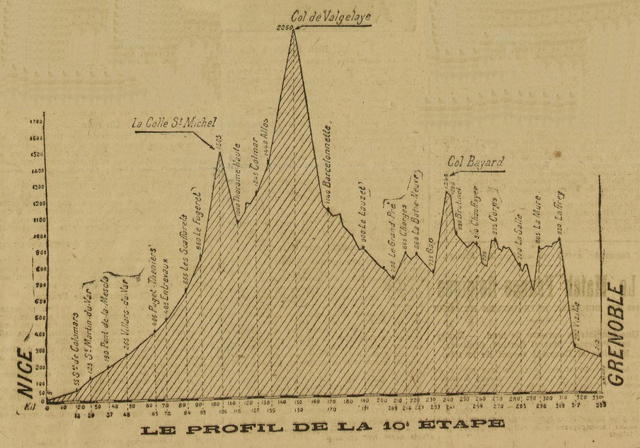 Tour de France 1919. Profil 10e étape